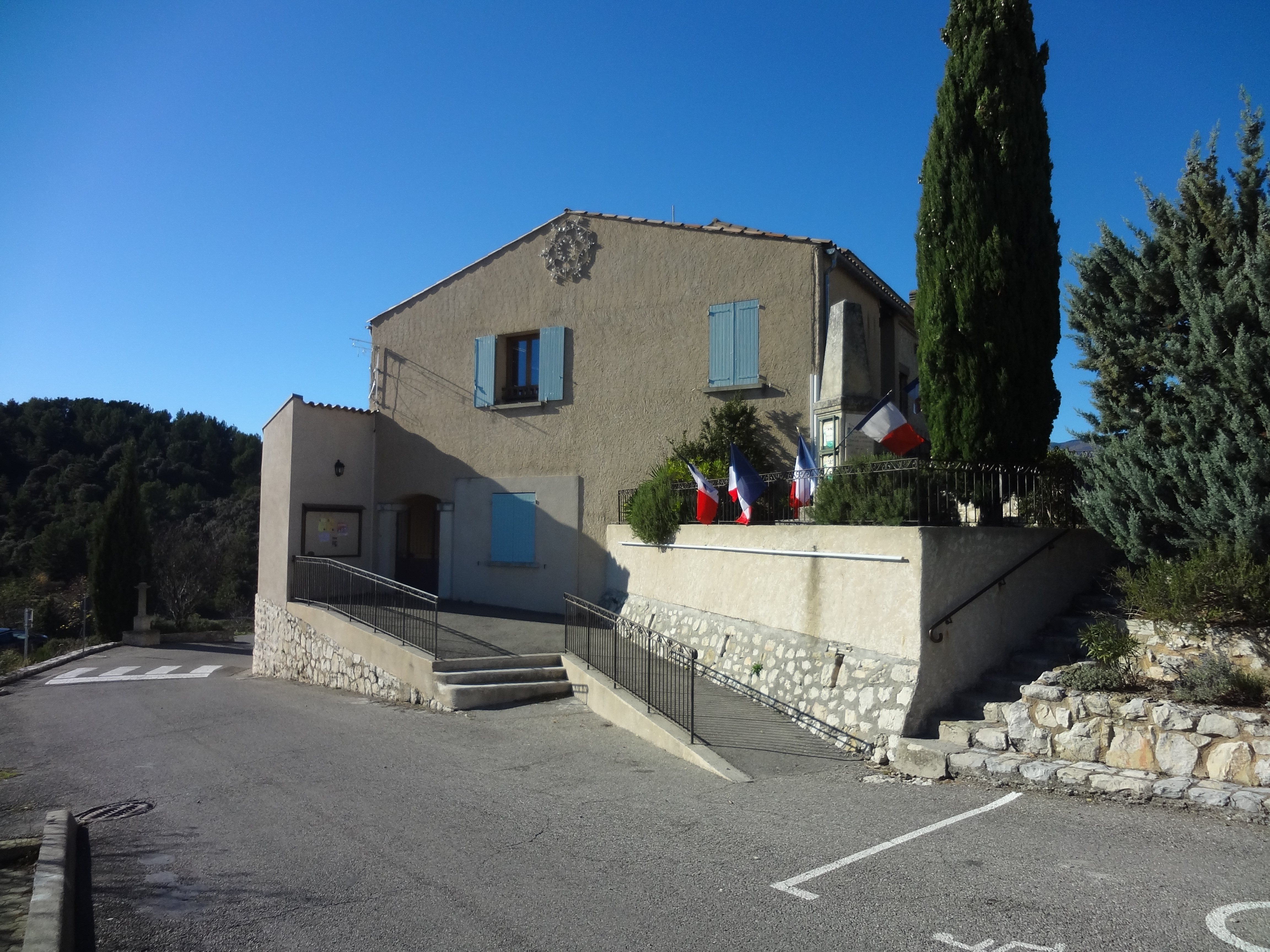 mairie de Montfort (Alpes-de-Haute-Provence)